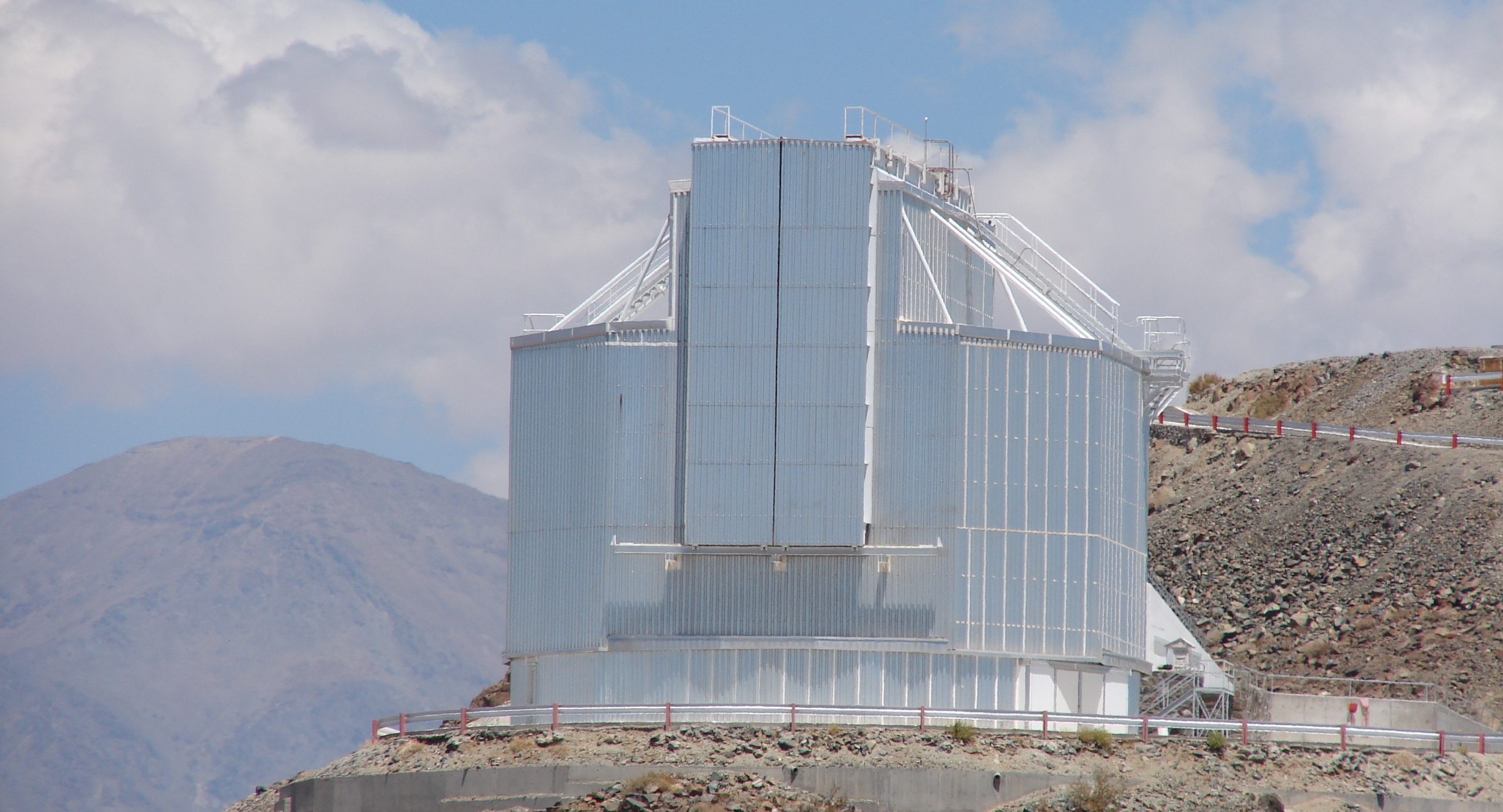 Observatorio astronomico de La Silla. Telescopio NTT